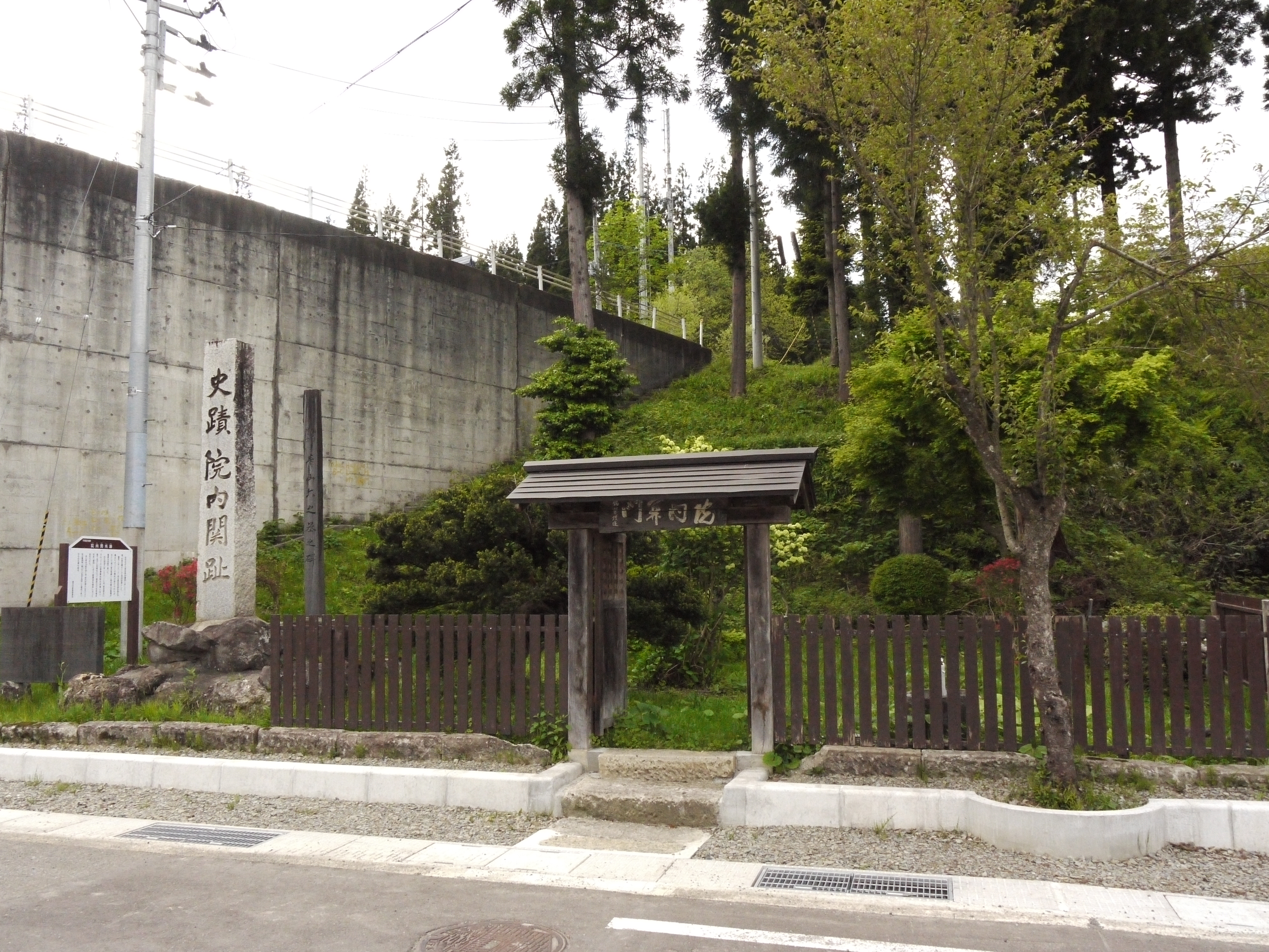 旧院内関跡